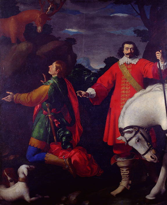 Visión de San Eustaquio